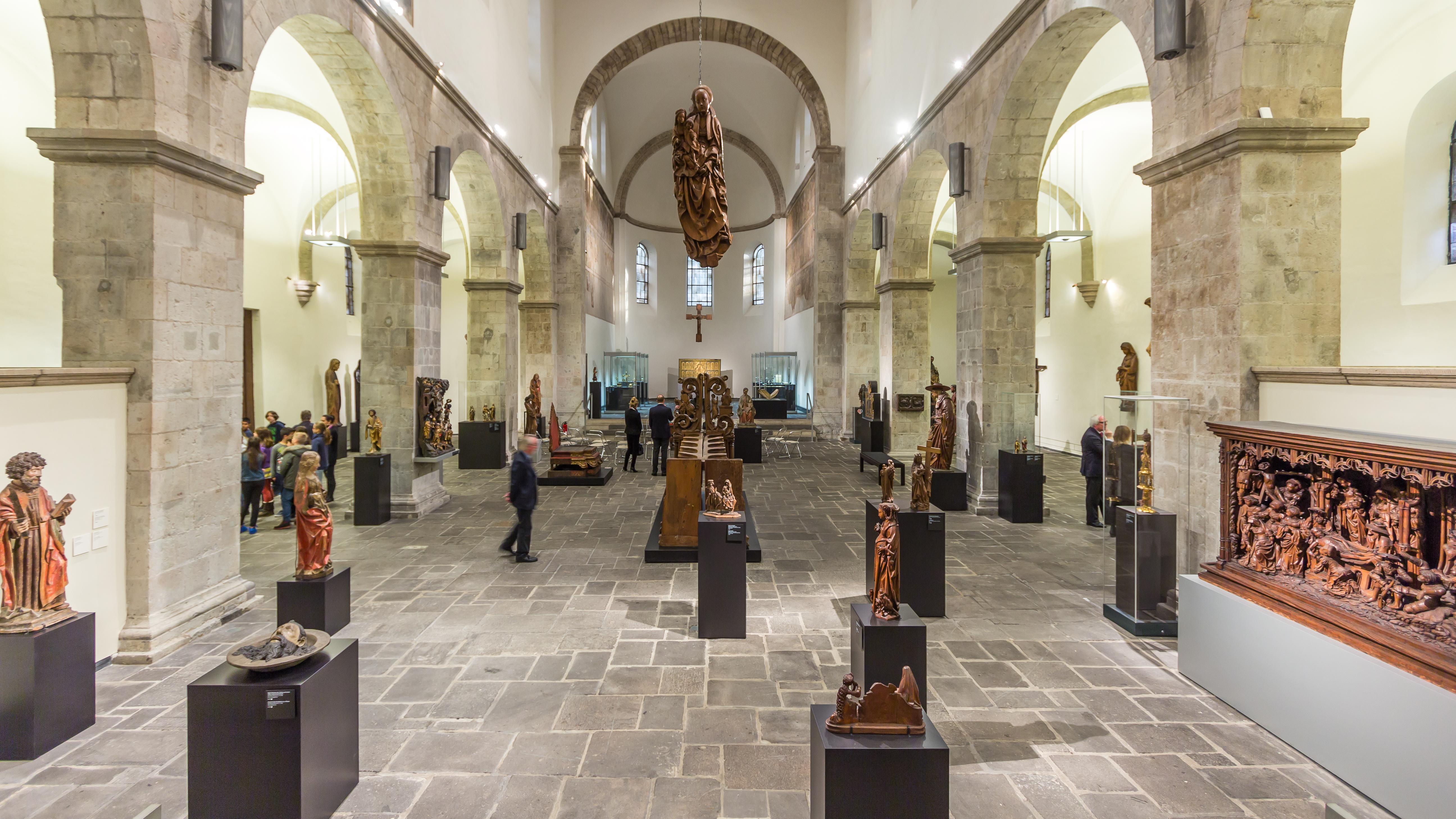 Museum Schnütgen - St. Cäcilien - Innenaufnahme